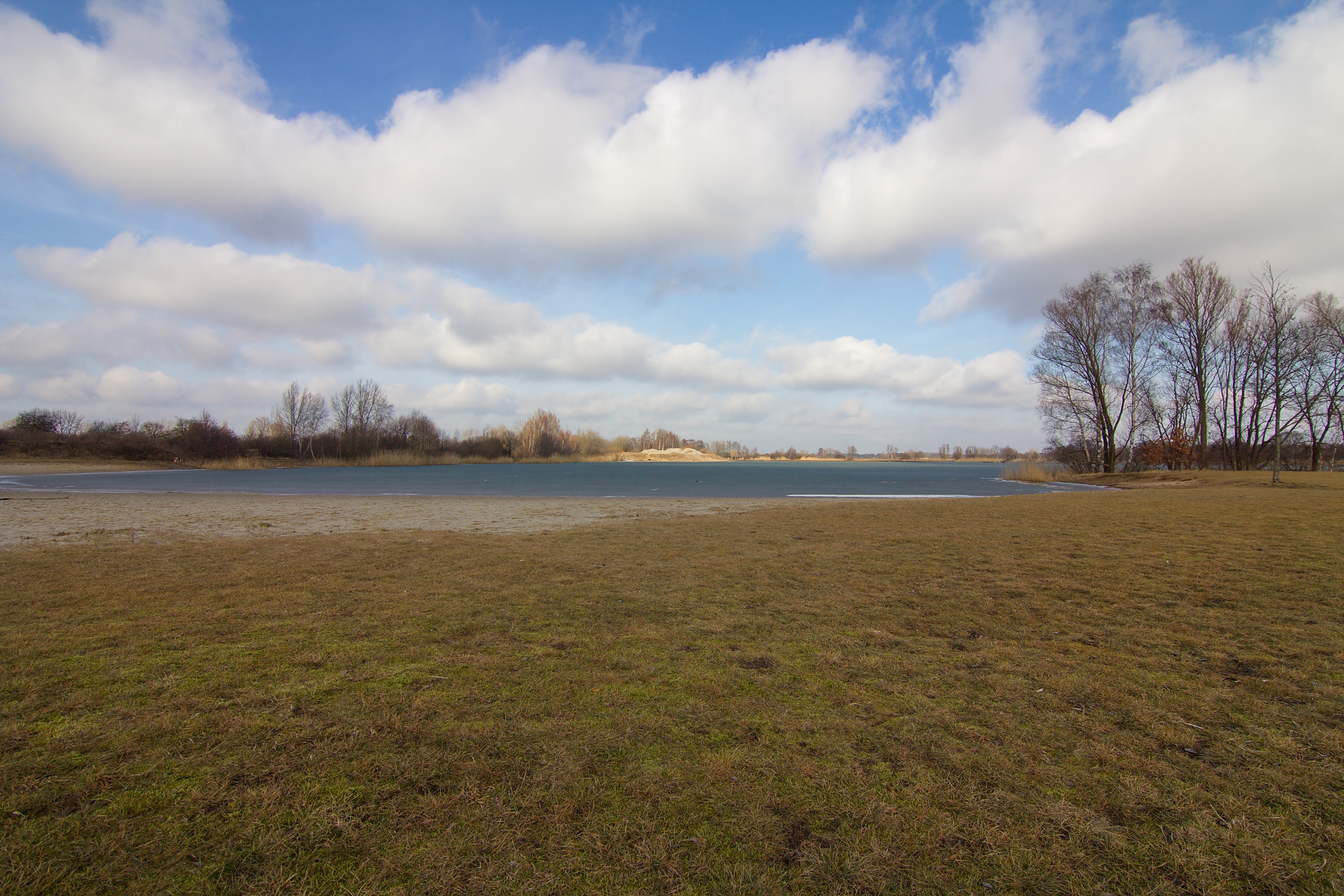 Hufeisensee im Wietzepark in der Niedernhägener Bauerschaft (Isernhagen), Niedersachsen, Deutschland.